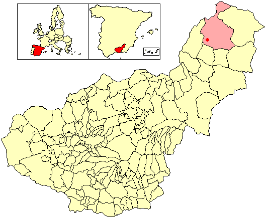 Situación de la localidad de Duda (en el municipio de Huéscar) respecto a la provincia de Granada, en España.